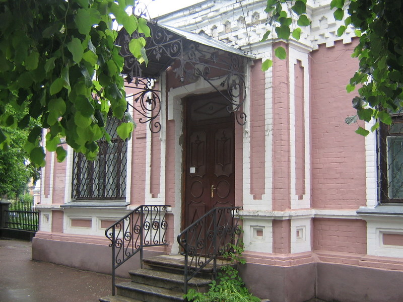 Бібліотека Владислава Реймонта